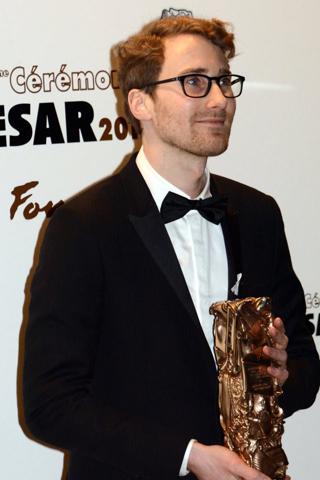 Le producteur Rémi Grellety à la cérémonie des César du cinéma.